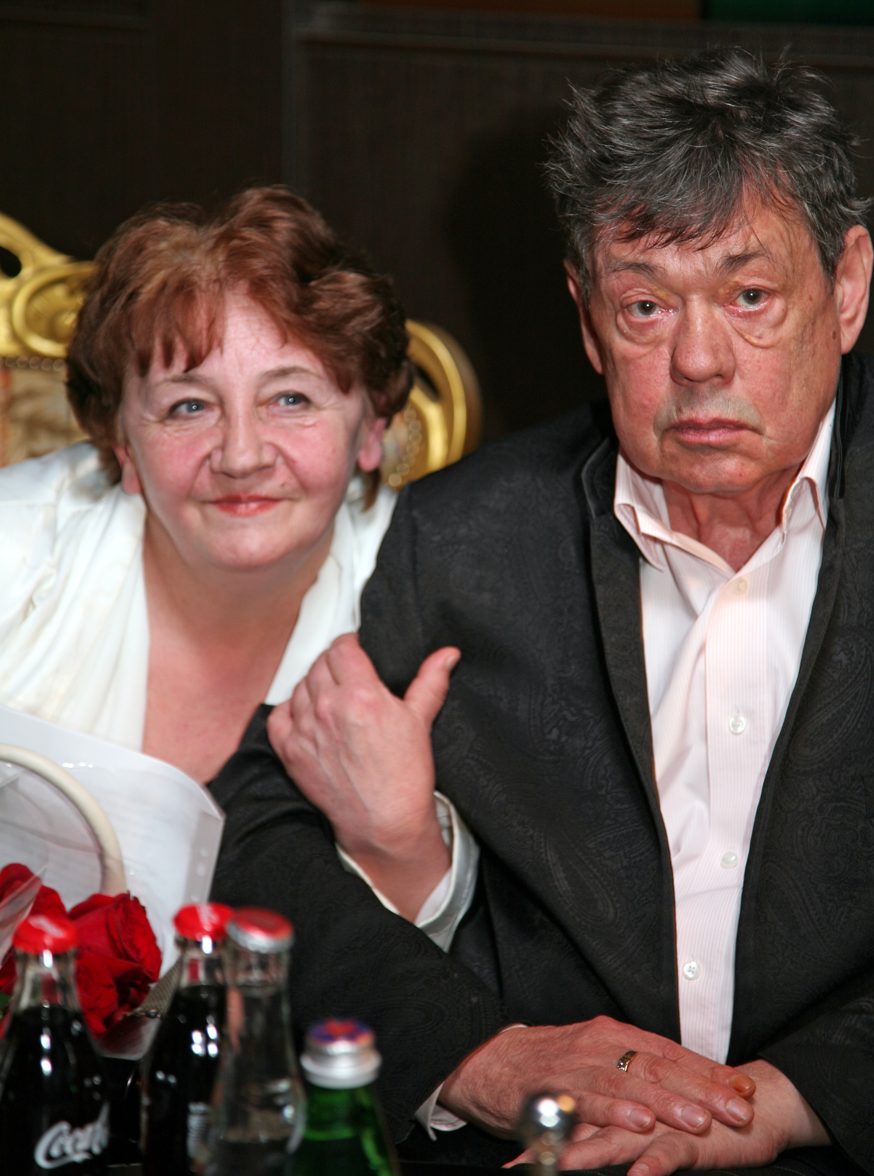 Николай Петрович Караченцов и композитор Елена Павловна Суржикова